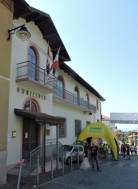 Colleretto Castelnuovo municipio gara podistica UISP